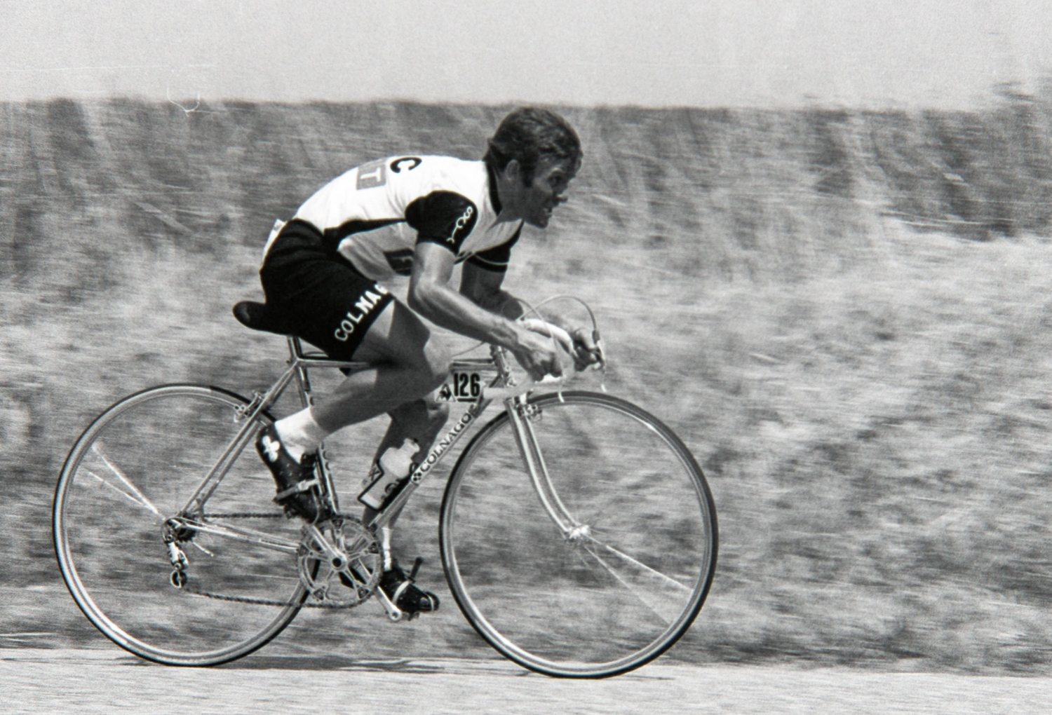 Wladimiro Panizza durant le Tour de France 1976. Photographie : René Milanese